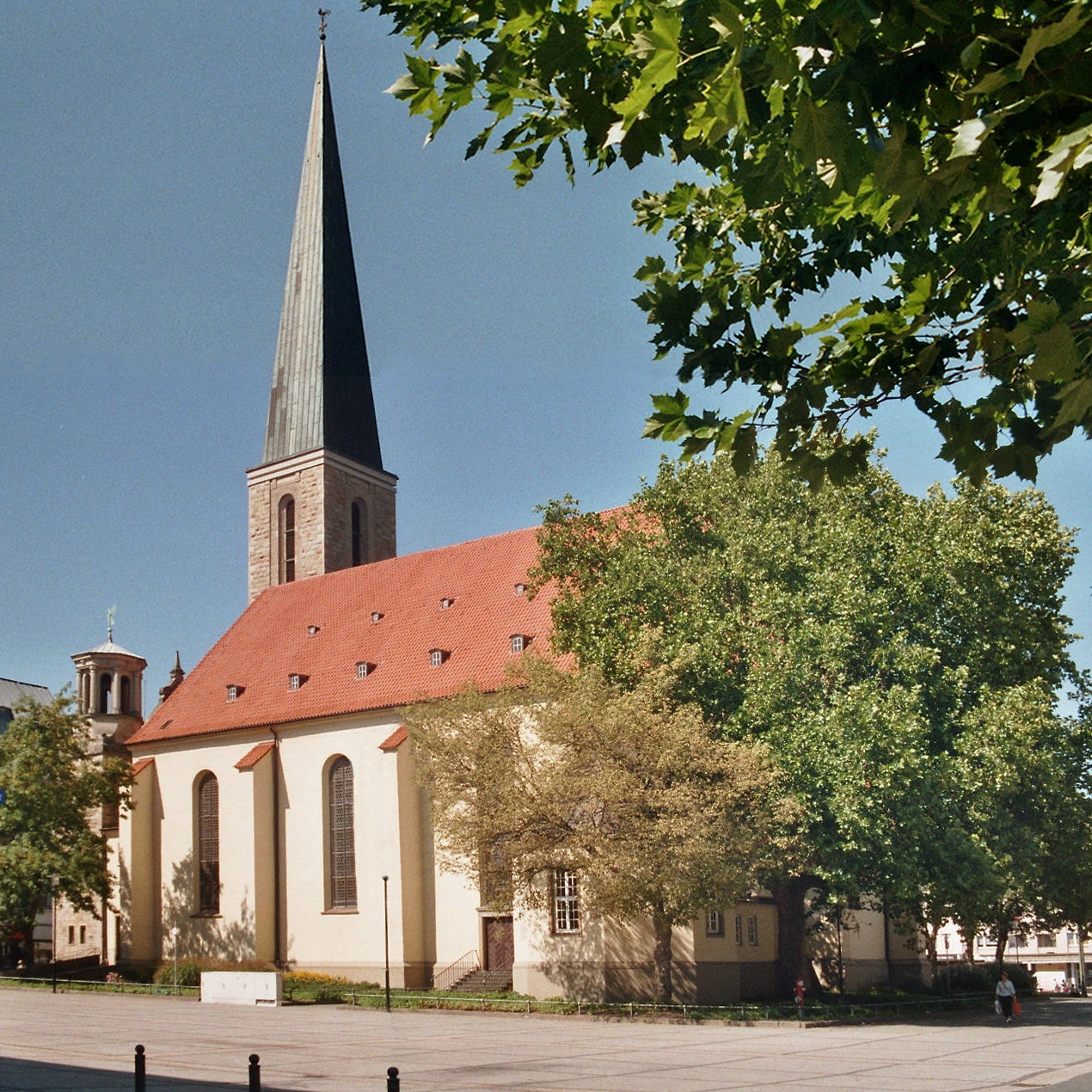 Hagen, Johanniskirche am Markt, Südansicht This is the photograph of an architectural monument. It is part of the list of cultural monuments of Hagen, no. 006